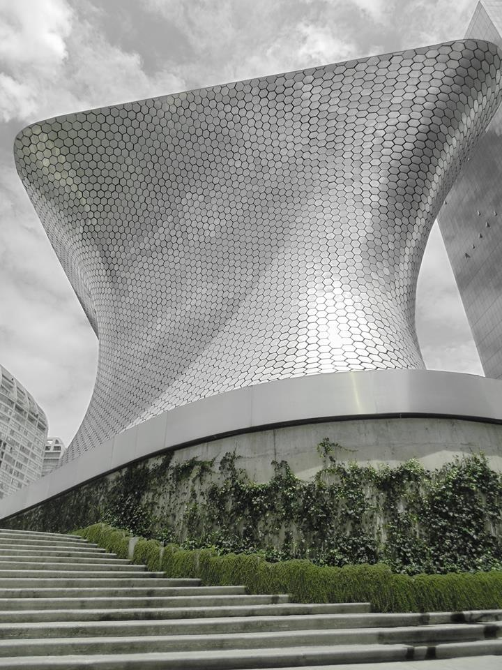 Vista de un costado del Museo Soumaya Plaza Carso — en Polanco, México, D. F.